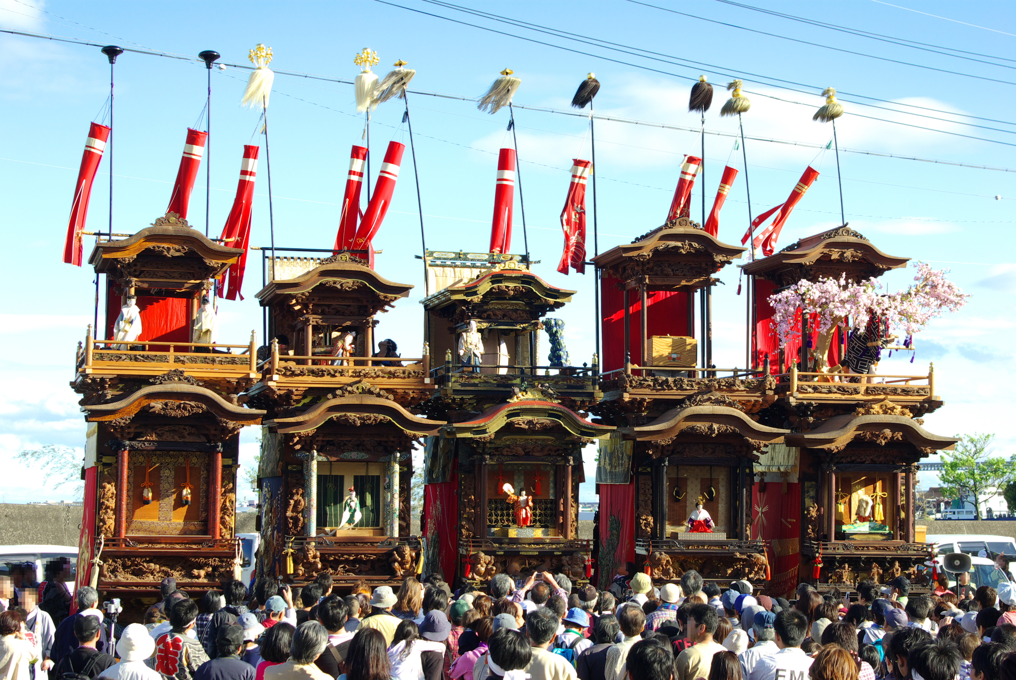 半田市亀崎潮干祭りの勢ぞろいした5つの山車